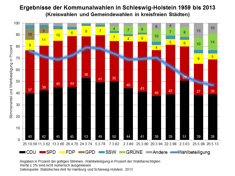 Ergebnisse der Kommunalwahlen in Schleswig-Holstein 1959 bis 2013